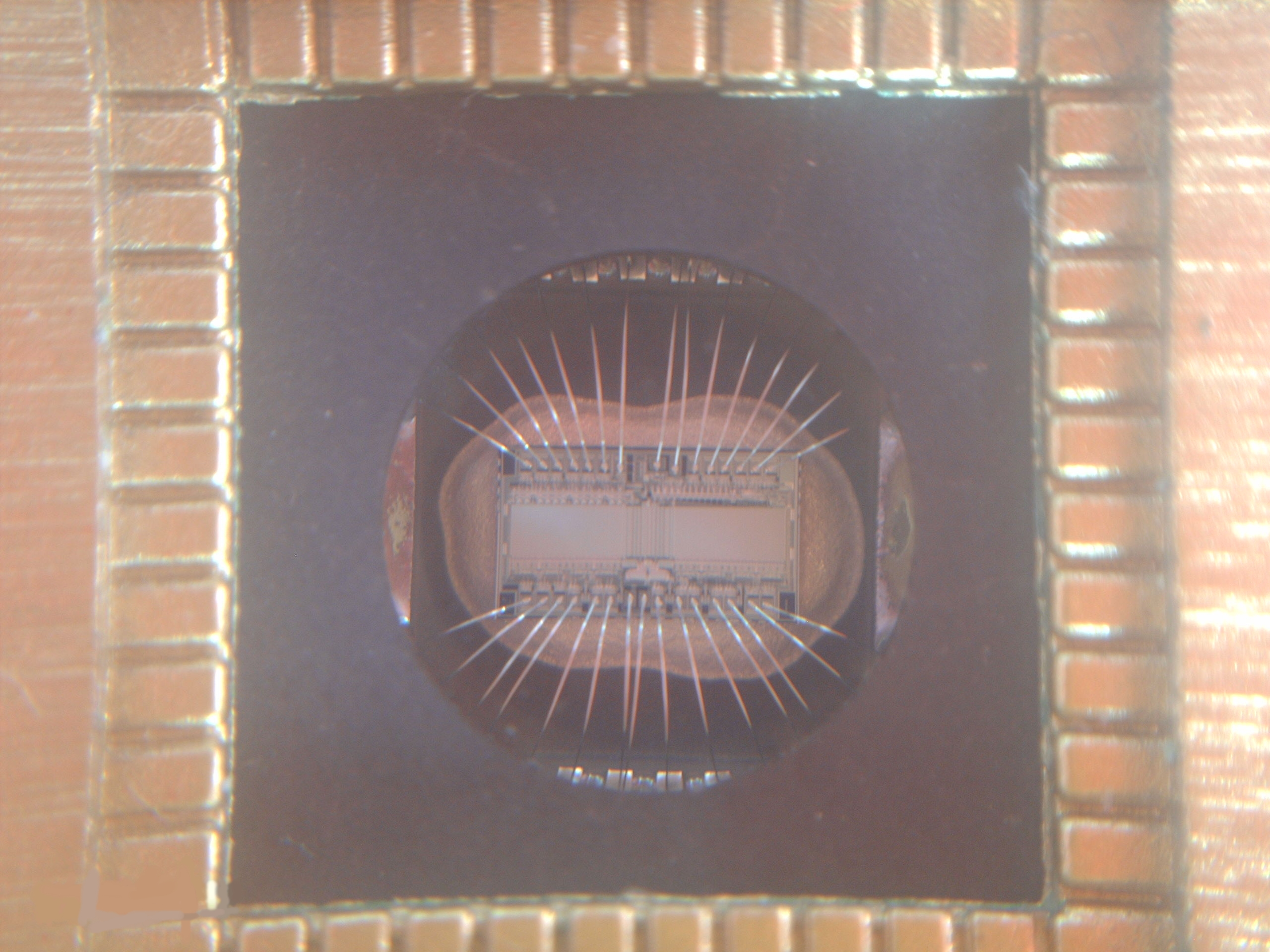 Imagen del chip de una memoria EPROM de 32KB de STMicroelectronics